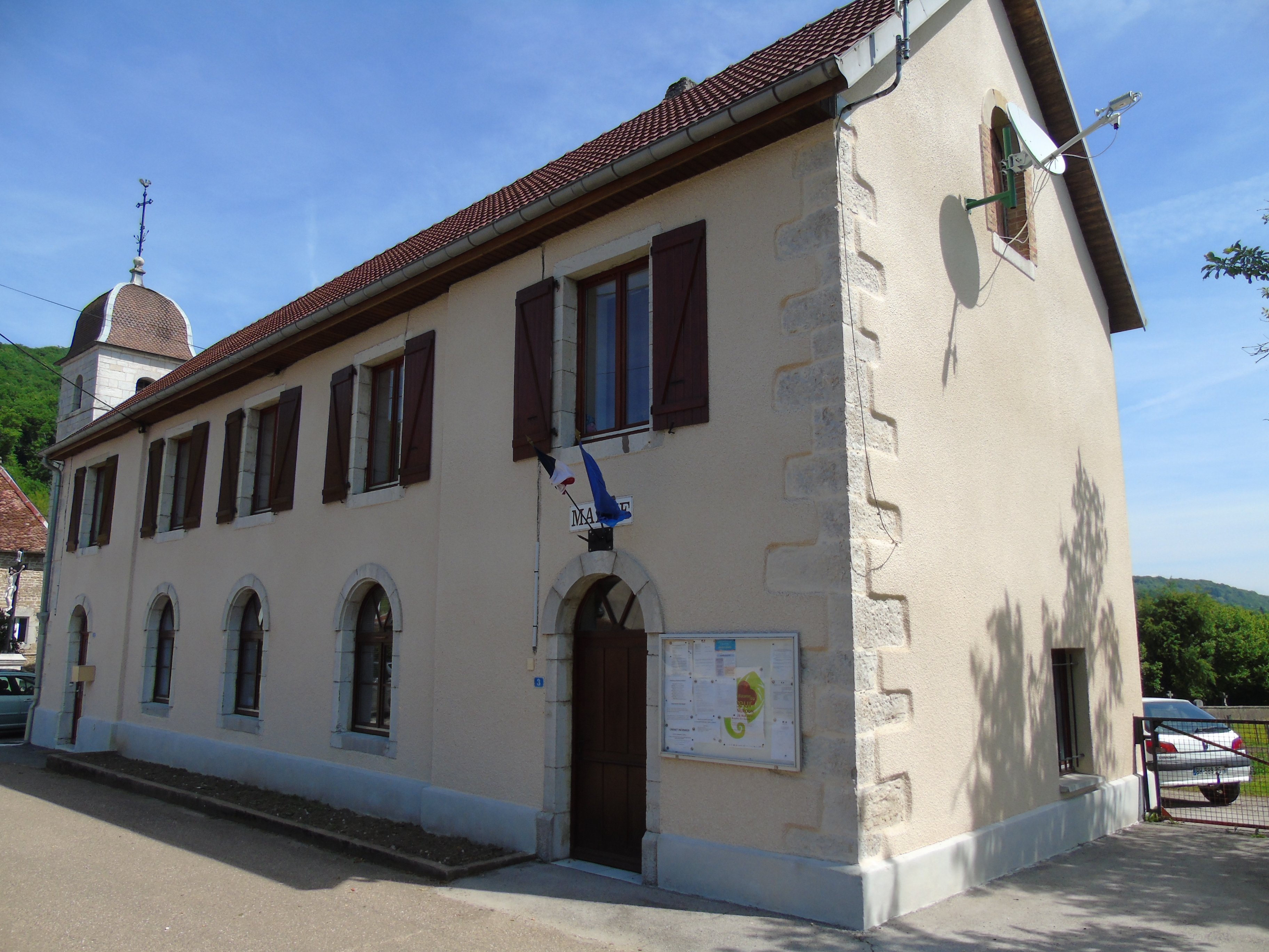 Mairie de Bretigney-Notre-Dame, Doubs, France